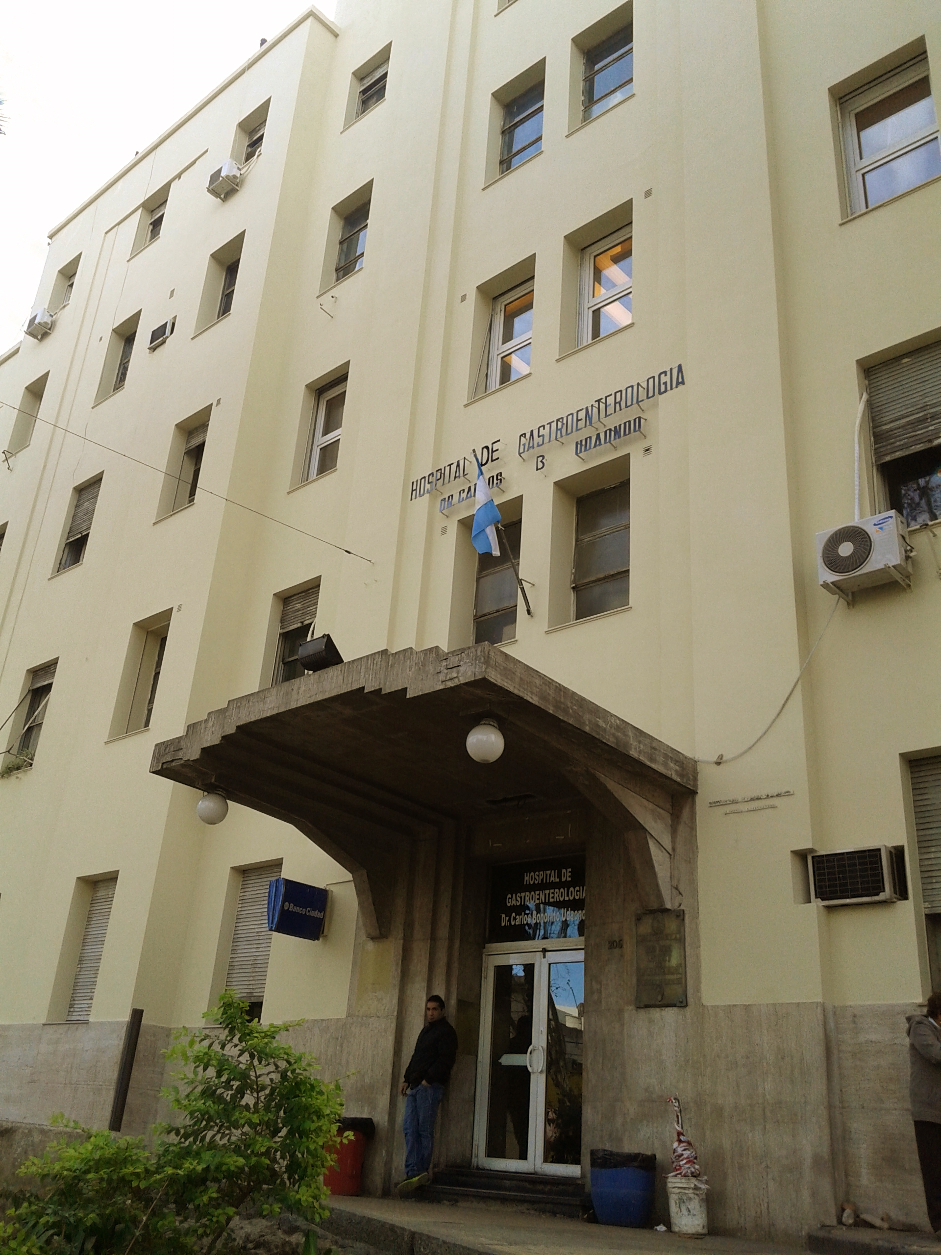 Hospital de Gastroenterologia Dr. Carlos Bonorino Udaondo - Buenos Aires - Argentina